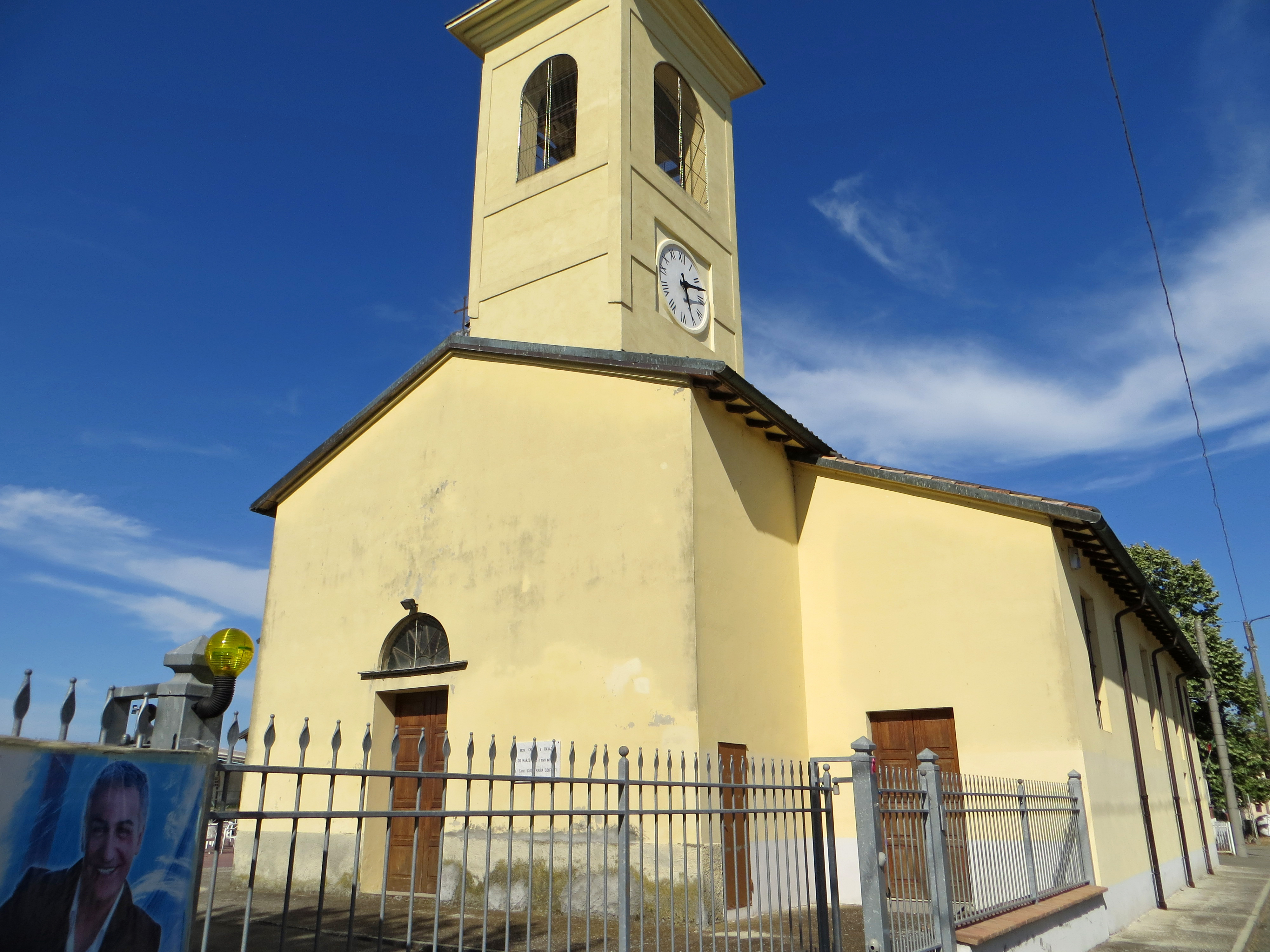 Chiesa della Purificazione di Maria Vergine (Ravadese, Parma) - facciata e lato sud